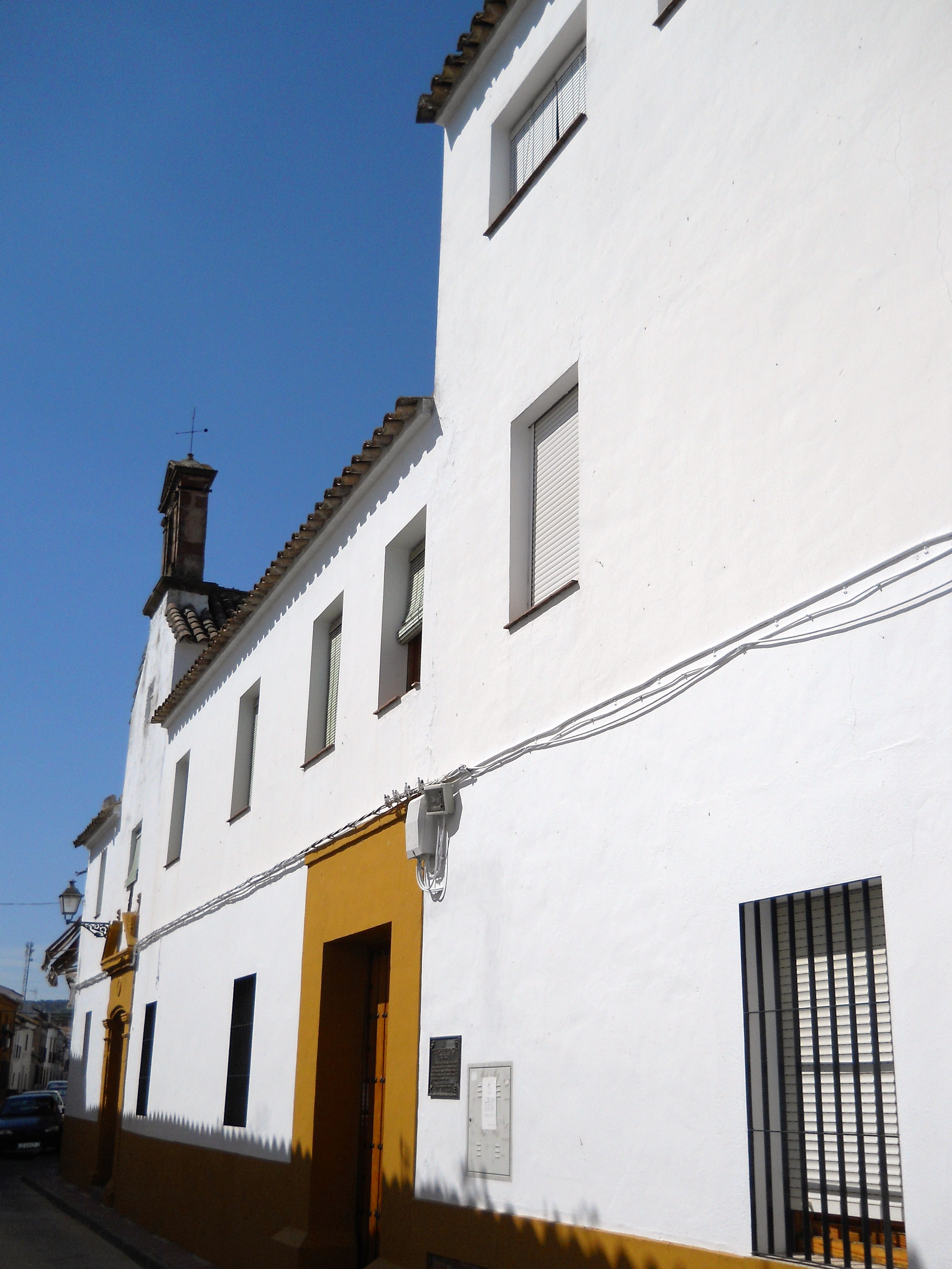 Fachada actual del primer convento que albergó a la orden creada por Luis Pérez Ponce.